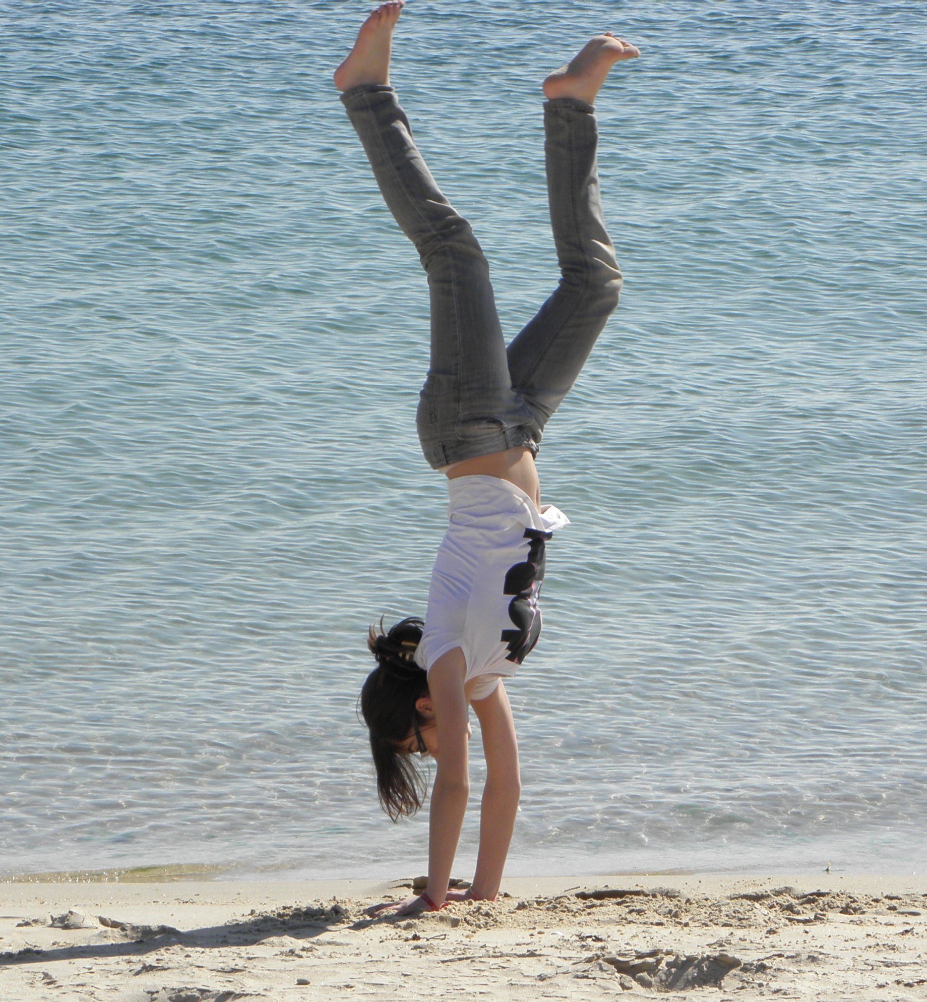 Praia da Corna, Palmeira, Ribeira